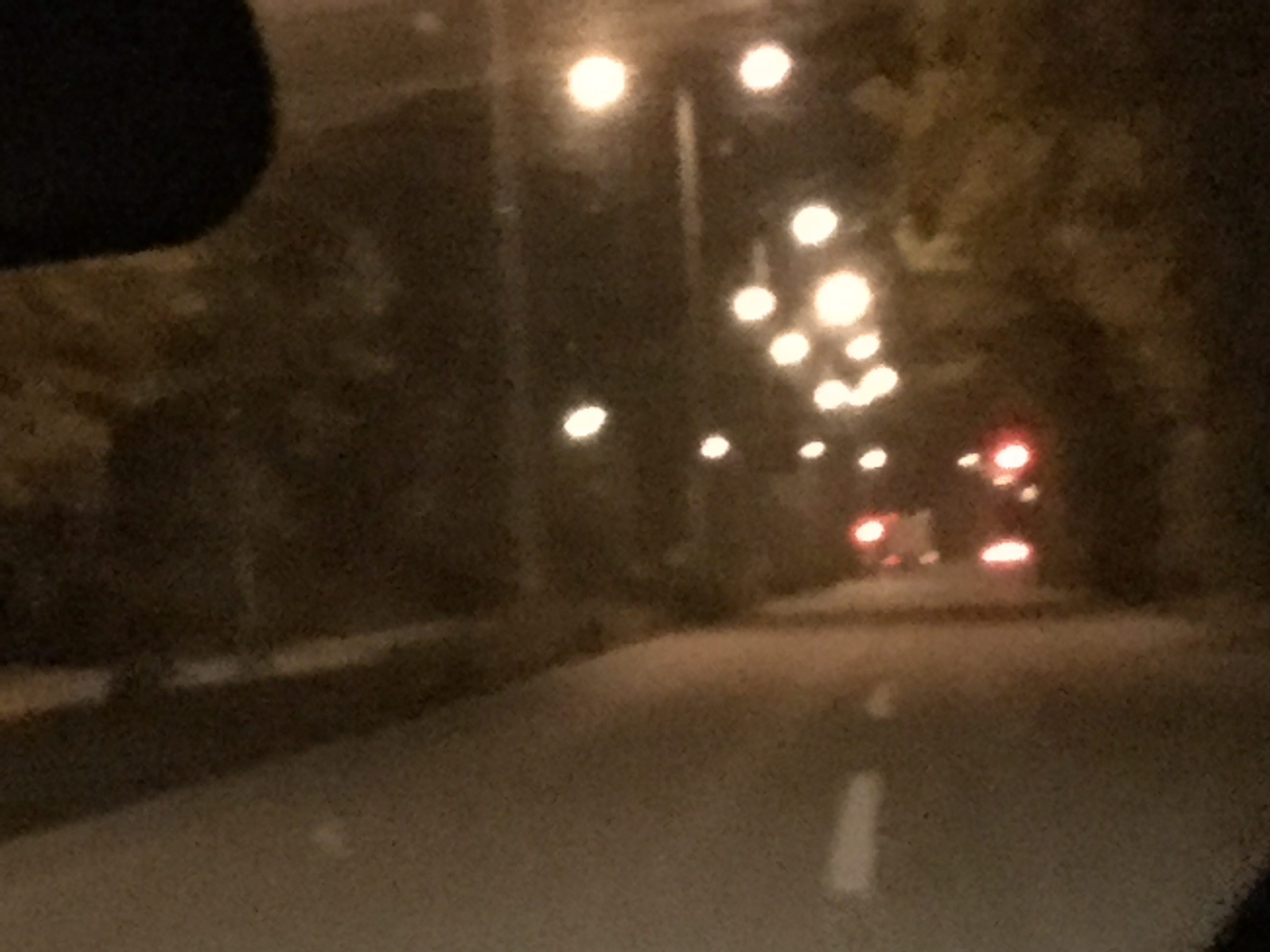 Η Περιφερειακή Οδός Τρικάλων (τμήμα κόμβου Πύλης-κόμβου Καρδίτσας) την νύχτα